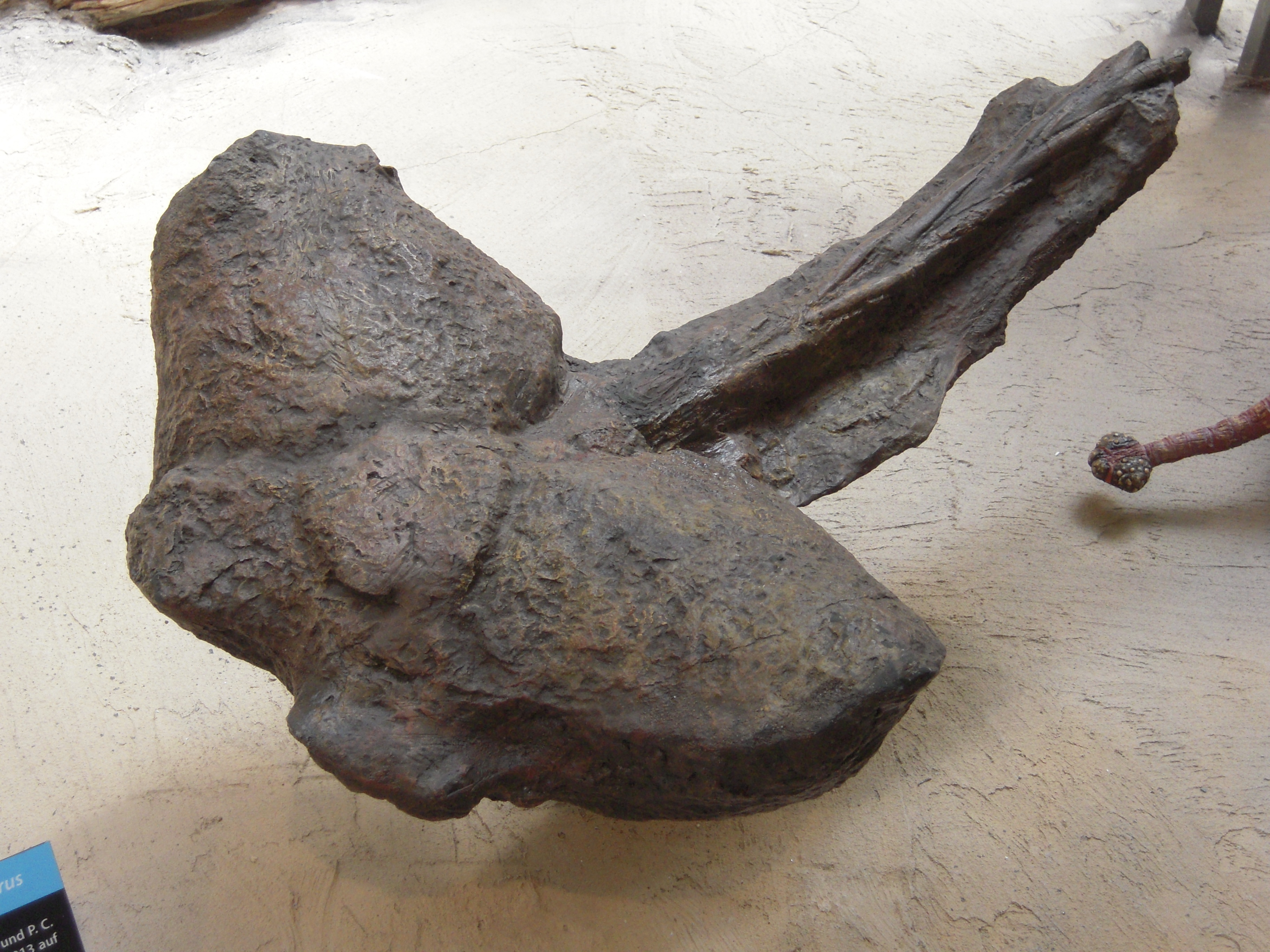 Schwanzkeule eines Anodontosaurus, aus der späten Kreide.